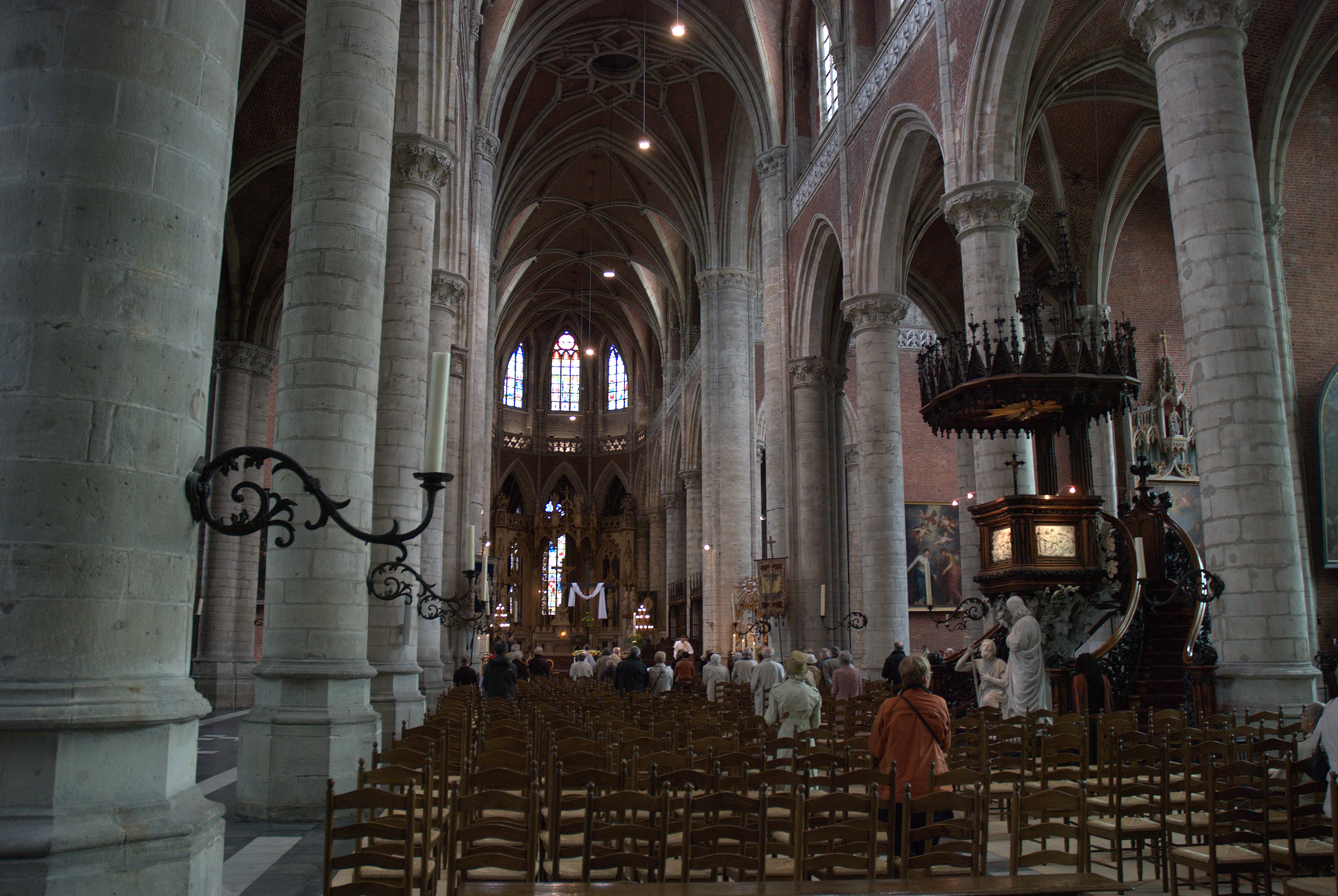 de Sint-Michielskerk te Gent, België